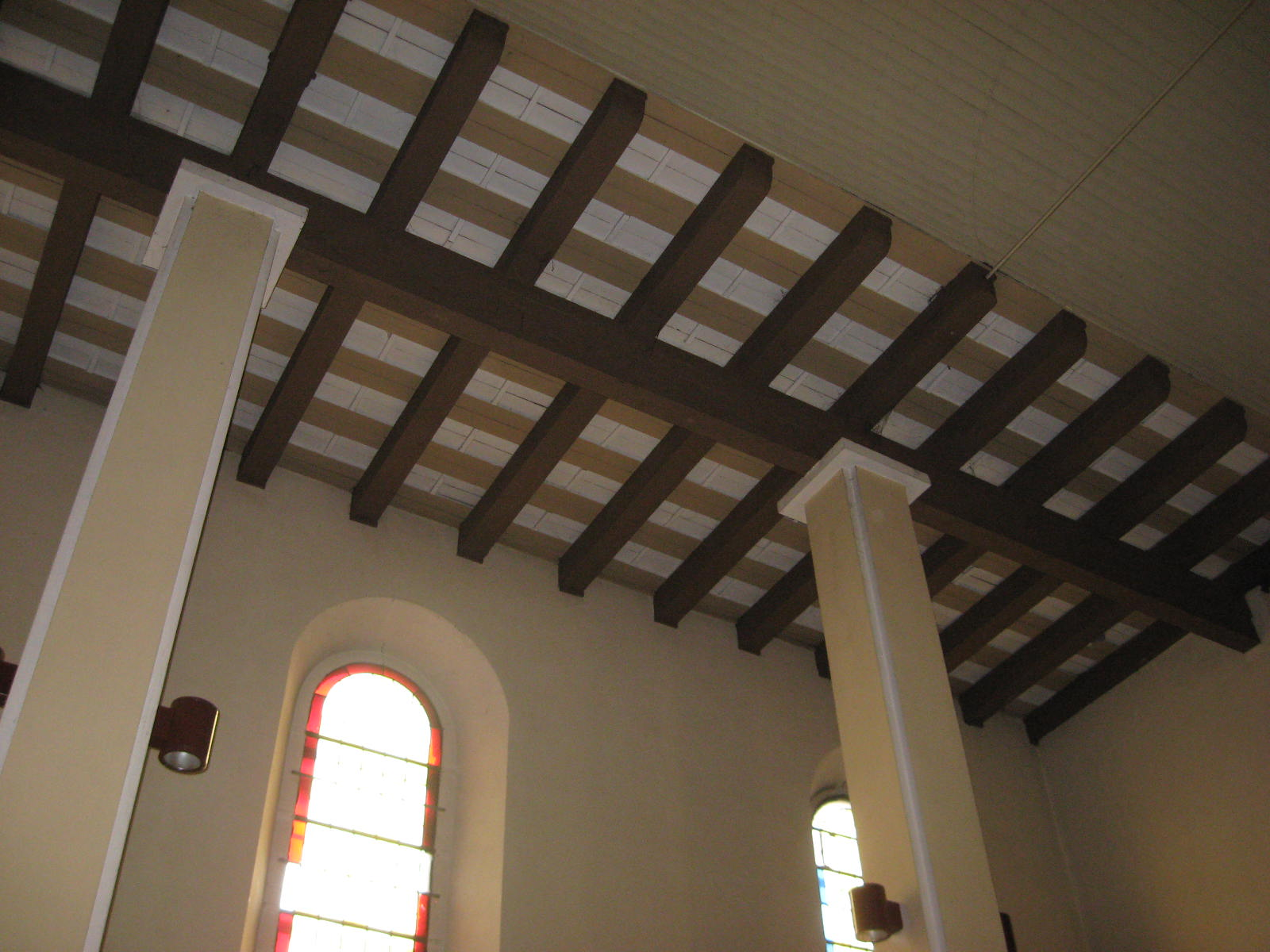 Sklepienie